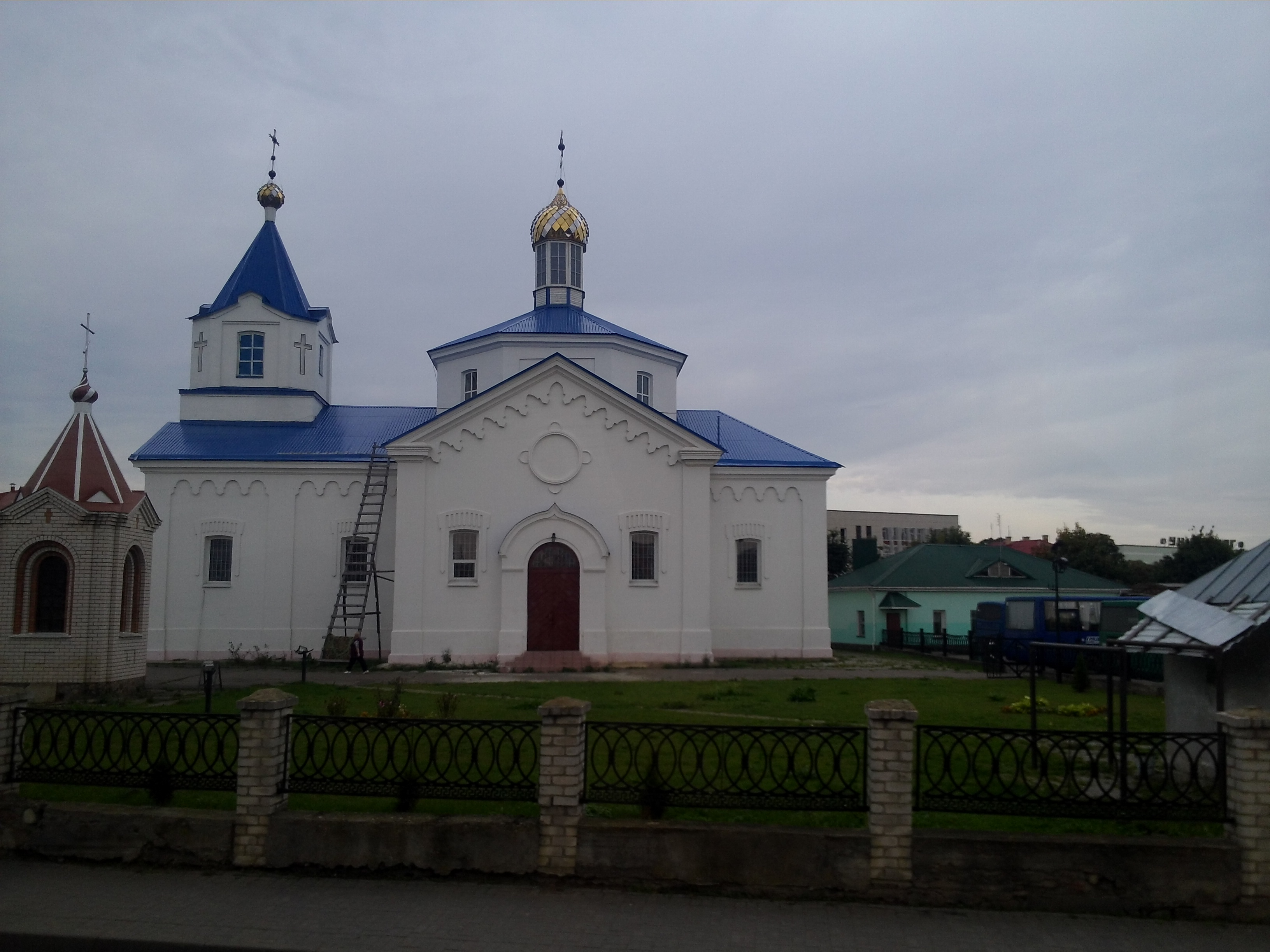 Православна церква у м. Ошмяни